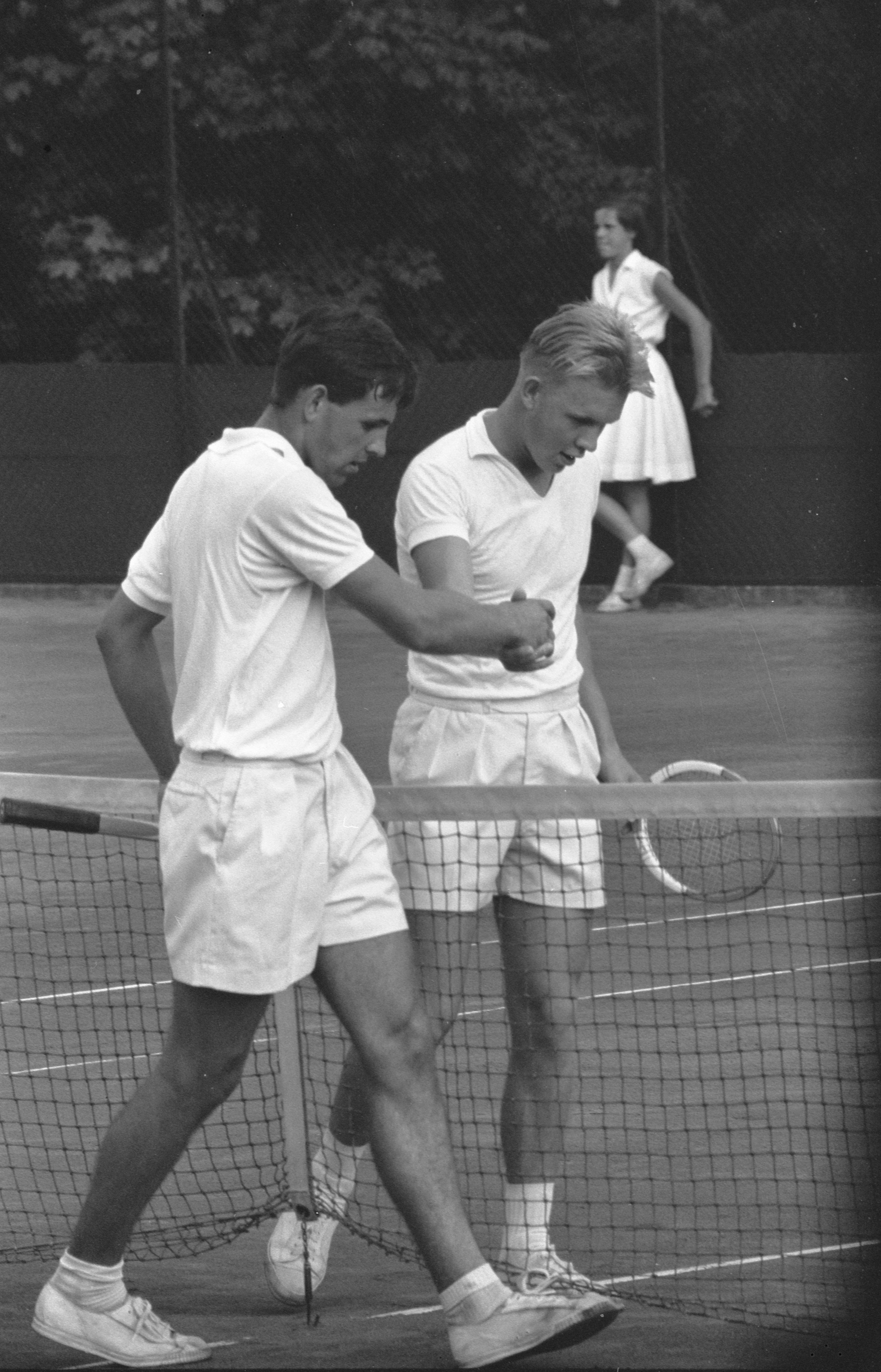 Collectie / Archief : Fotocollectie Anefo Reportage / Serie : [ onbekend ] Beschrijving : Tenniswedstrijden om de Coupe de Galea , Musacjon links Willem Maris , rechts Toomas Leius Datum : 17 juli 1959 Fotograaf : Bilsen, Joop van / Anefo Auteursrechthebbende : Nationaal Archief Materiaalsoort : Negatief (zwart/wit) Nummer archiefinventaris : bekijk toegang 2.24.01.05 Bestanddeelnummer : 910-5341